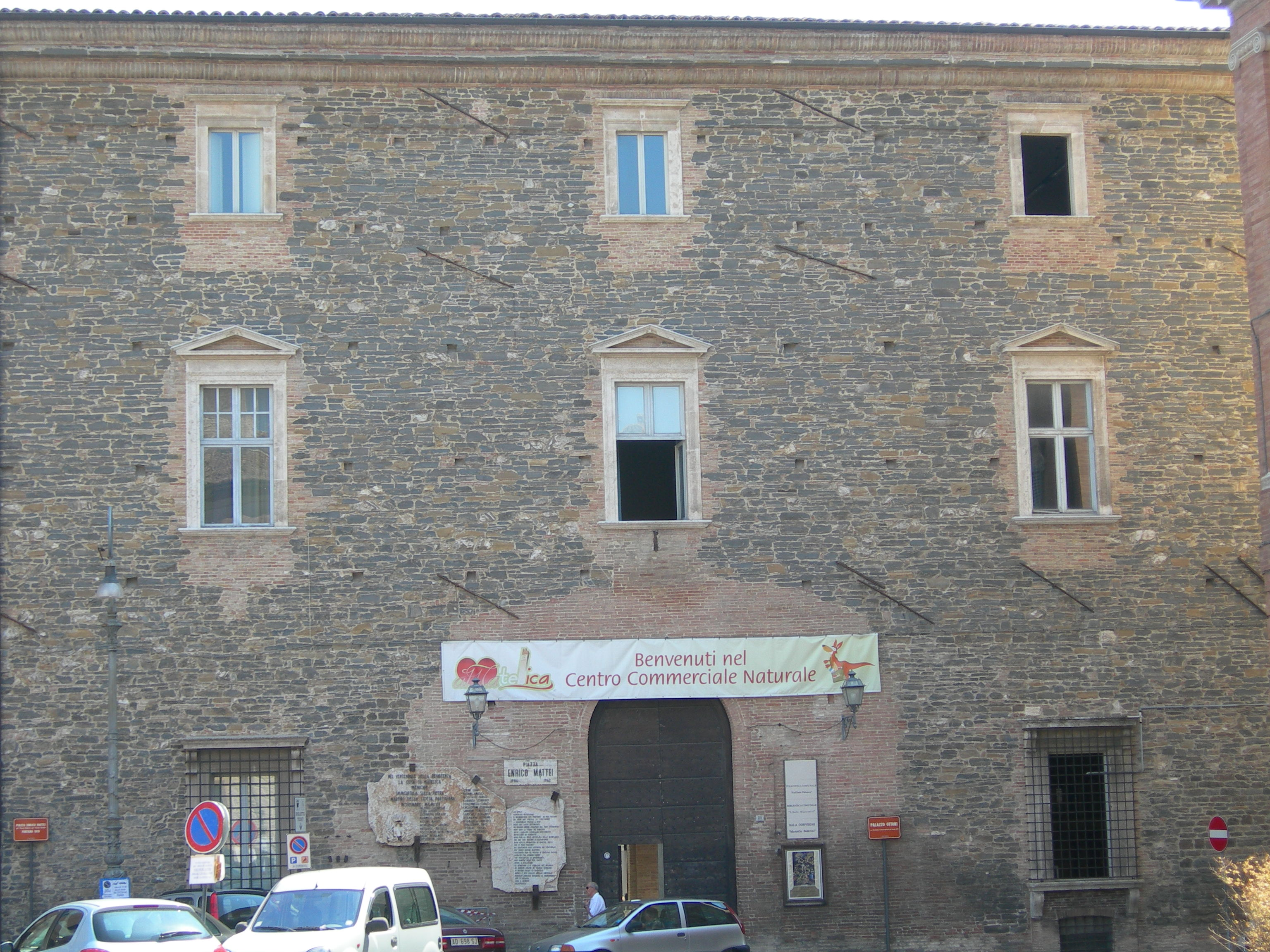 Torre di matelica e palazzo del comune